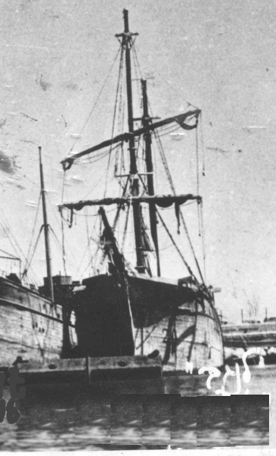 אוניית המעפילים "לנגב"